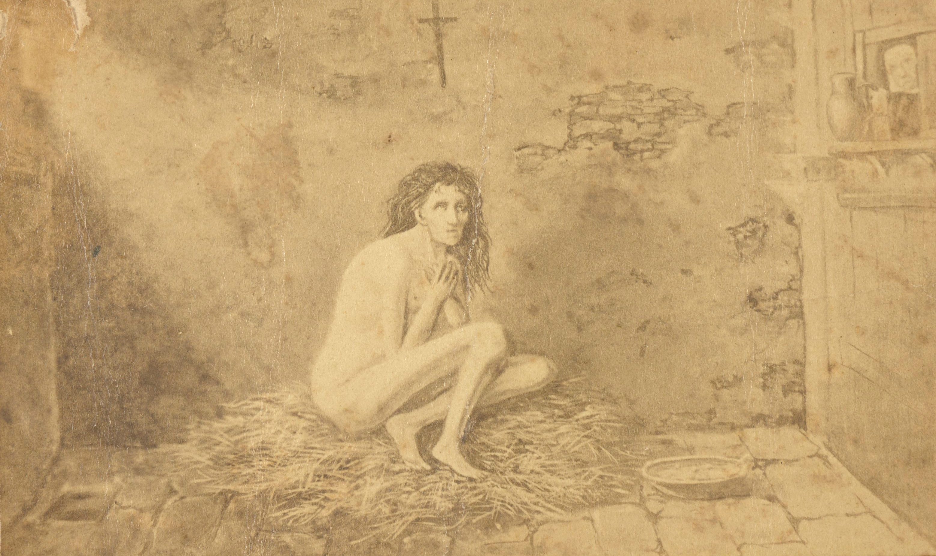 Barbara Ubryk